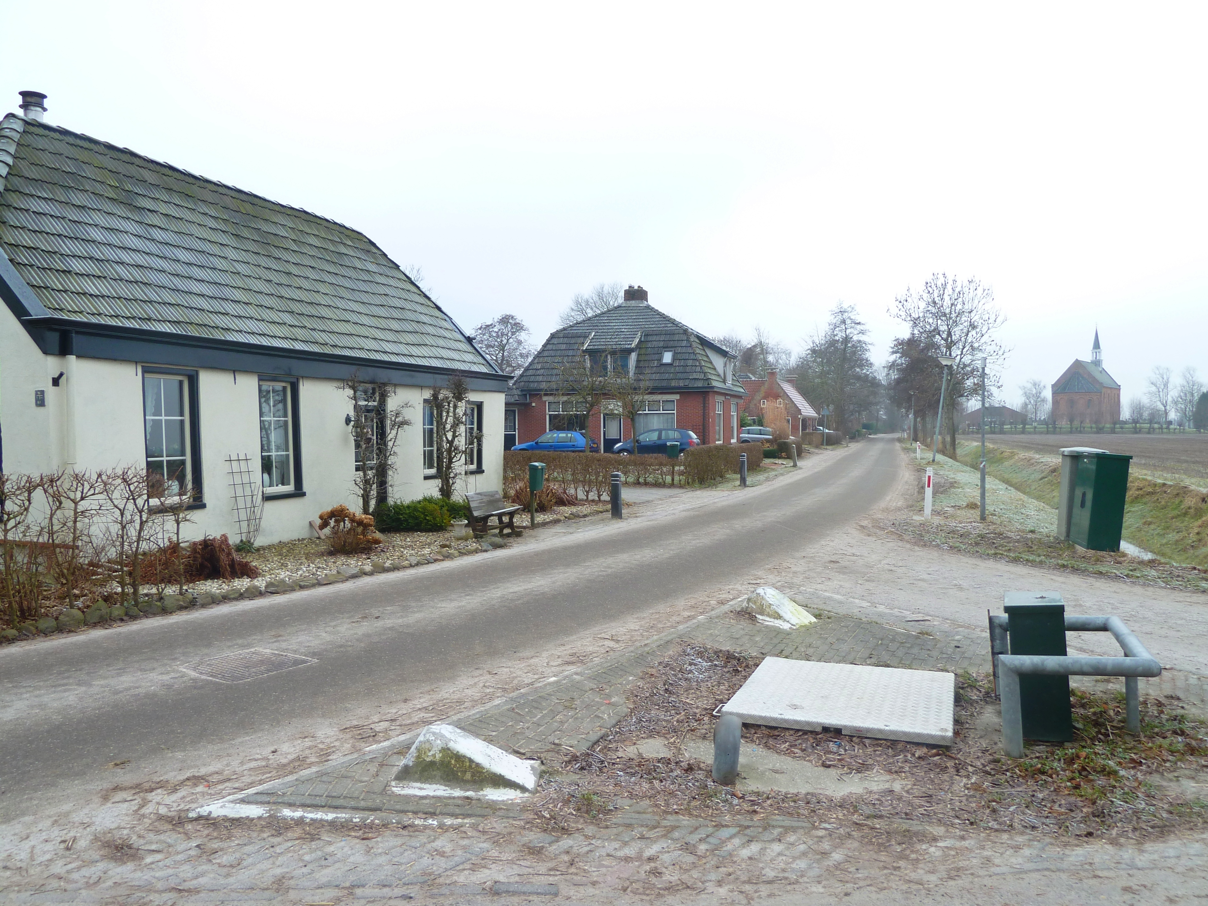 Huizen aan de Oldenzijlsterweg in Oldenzijl (Eemsmond, Groningen, Nederland).